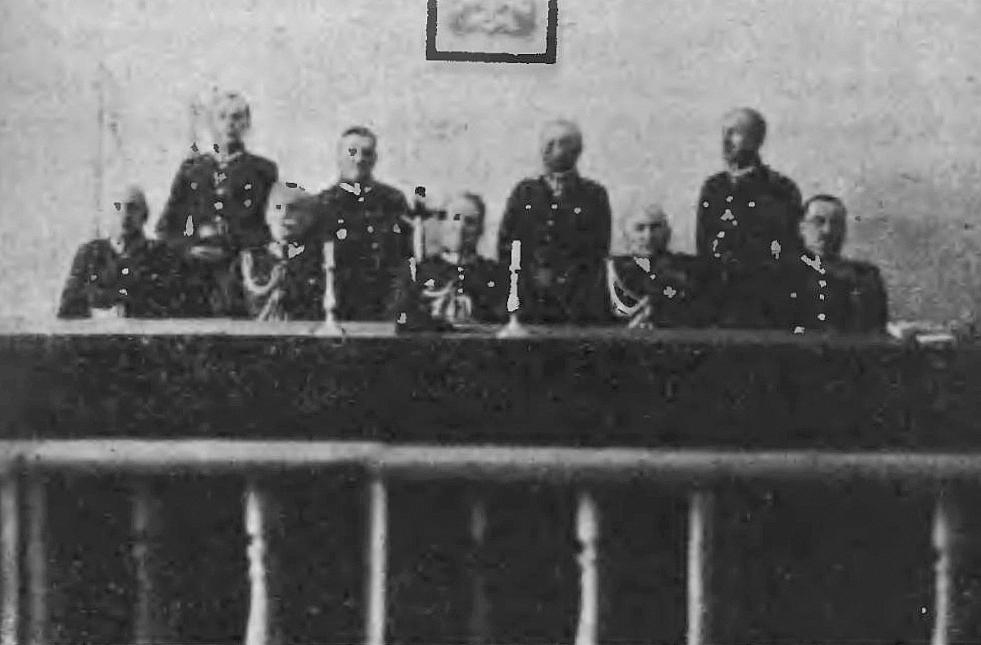 Najwyższy Sąd Wojskowy ok. 1926-1928. Siedzą od lewej: płk Jan Rzymowski (prokurator przy NSW), gen. Stanisław Śliwieński, gen. Jakub Krzemieński (prezydent NSW), gen. Bronisław Karol Sikorski, płk Witold Szulborski. Stoją od lewej: kpt. Eugeniusz Bogdzewicz (asystent w NSW), płk Stanisław Libkind-Lubodziecki, płk Edmund Kaczkowski, płk Józef Zołoteńki.